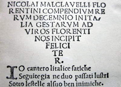 Faksiimile Machiavelli I Decennale 1506. a veebruari väljaandest, lk 2